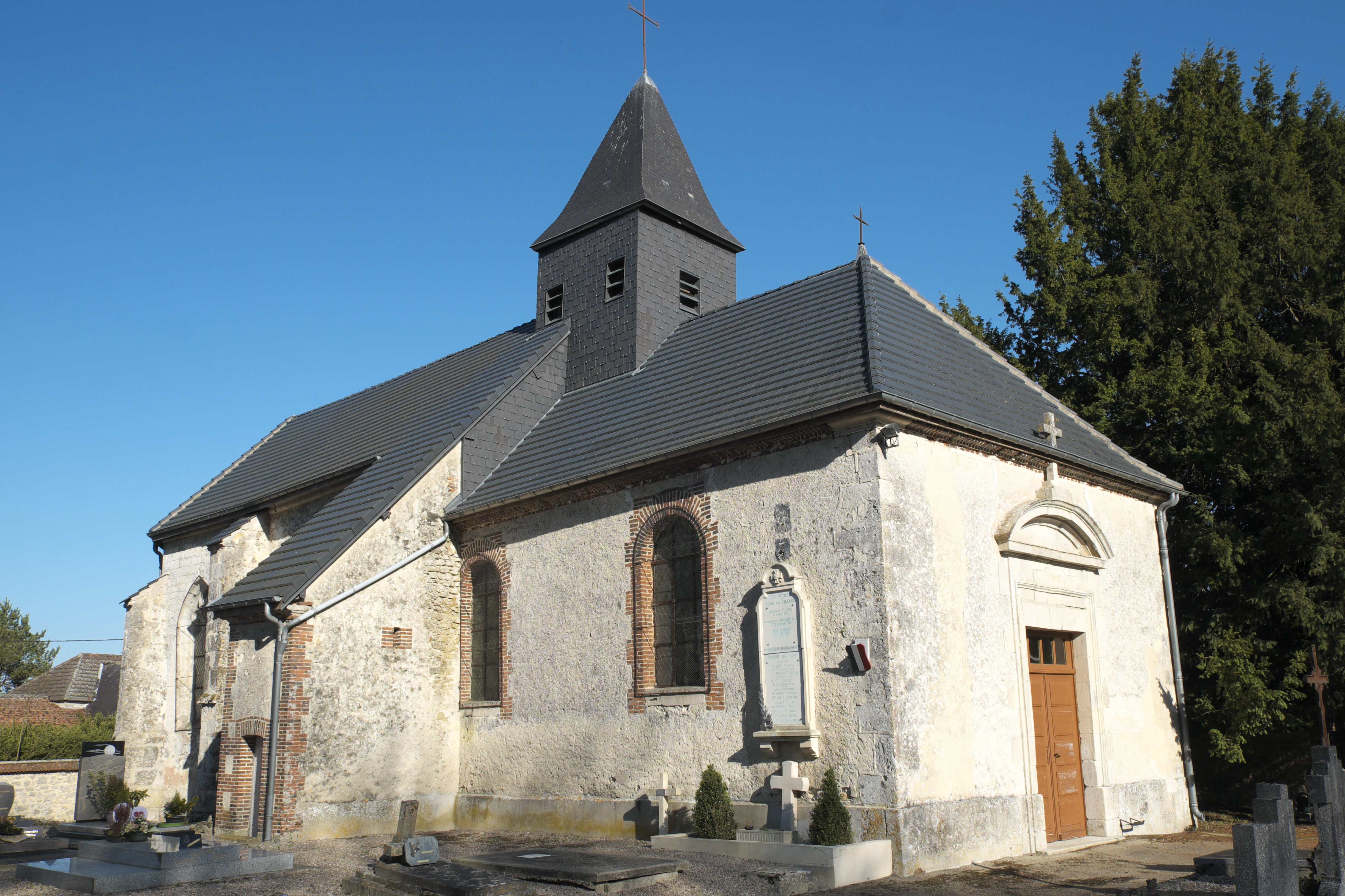 Kirche Saint-Fal in Aulnay-aux-Planches (Val-des-Marais) im Département Marne (Region Grand Est/Frankreich)